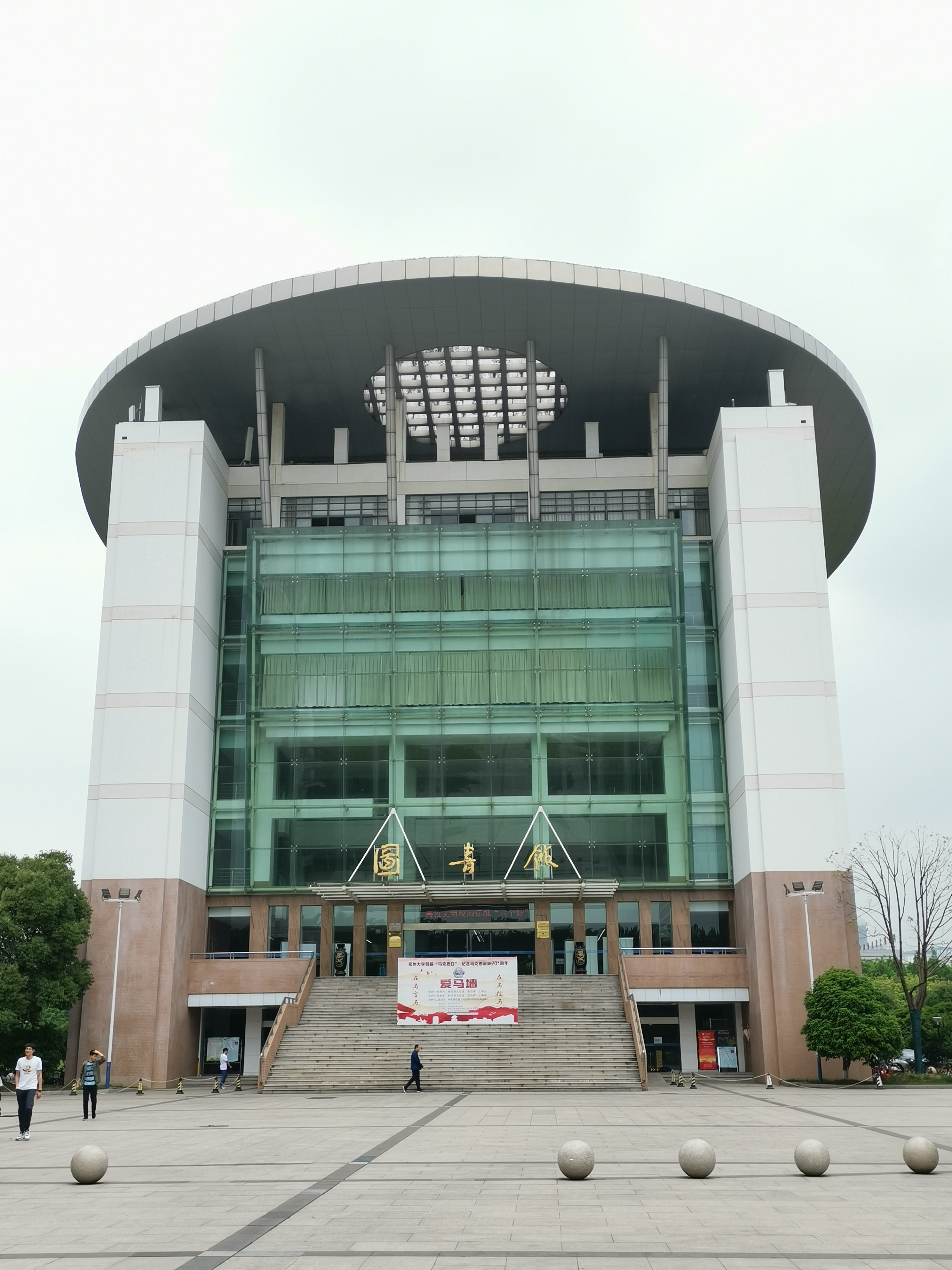 常州大学图书馆